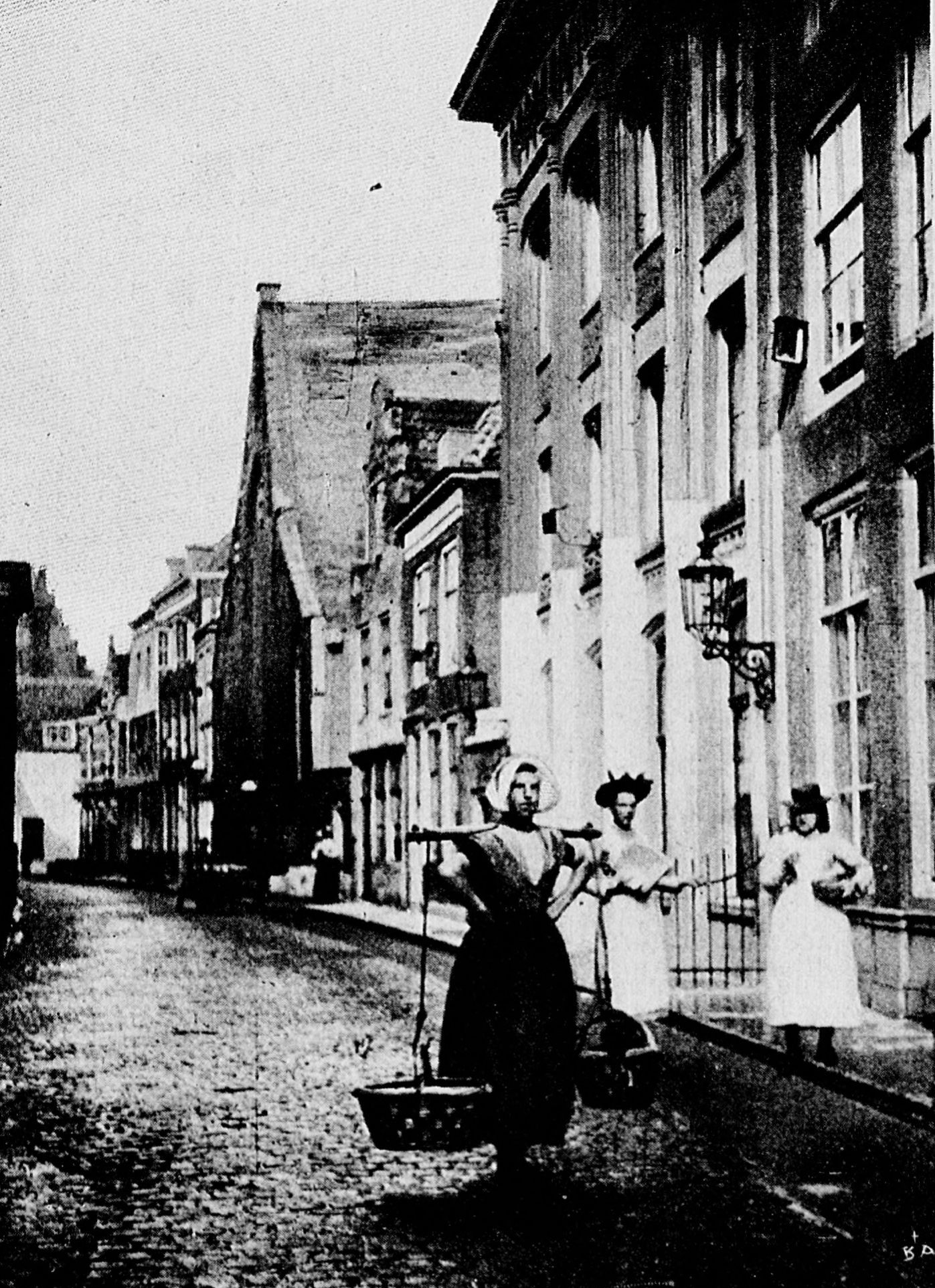 Le paysan hollandais. Photographie de Ludovic-Georges Hamon, dit Hamon-Trémeur (1875-1942)